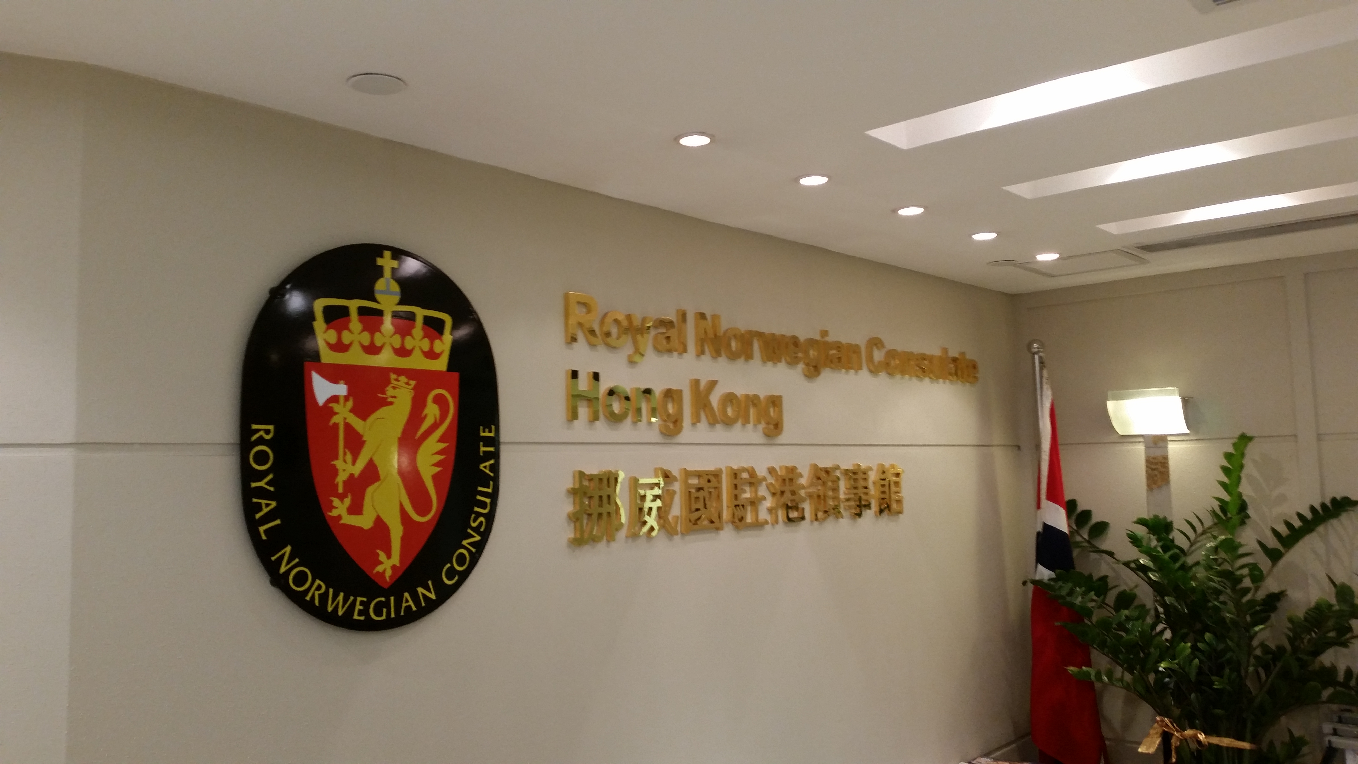 Royal Norwegian Consulate Hong Kong